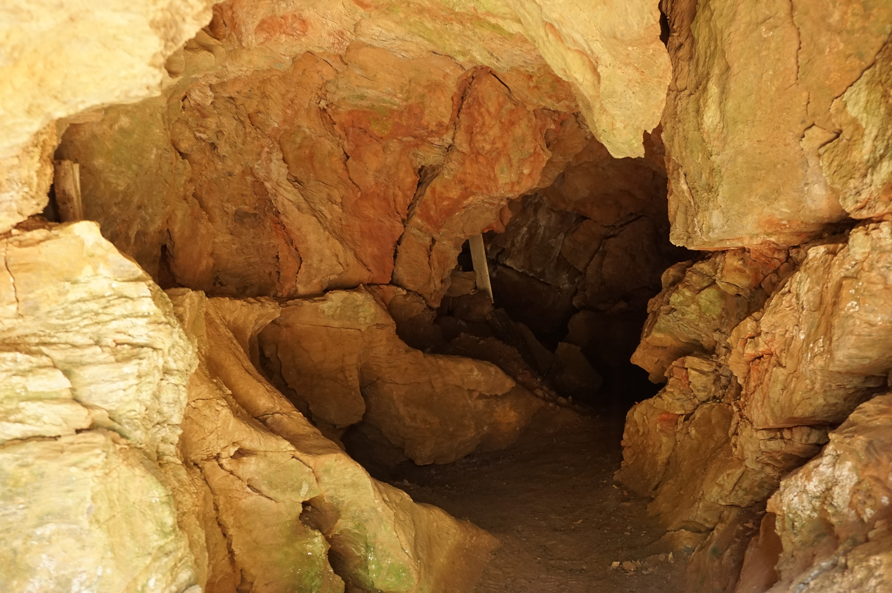 Loupežnická jeskyně v Solvayově lomu u Křižan